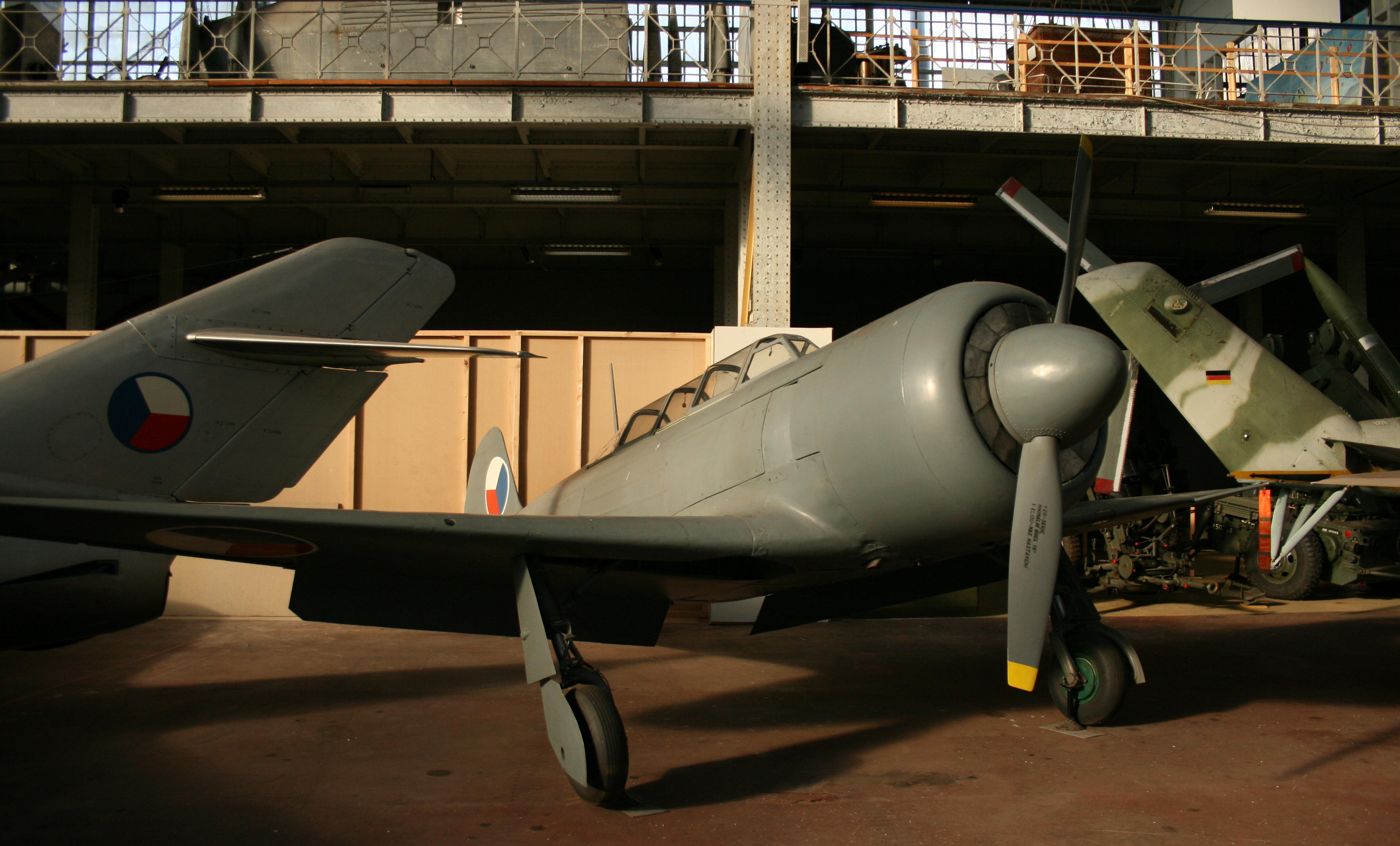 Yakovlev Yak-11 military training aircraft